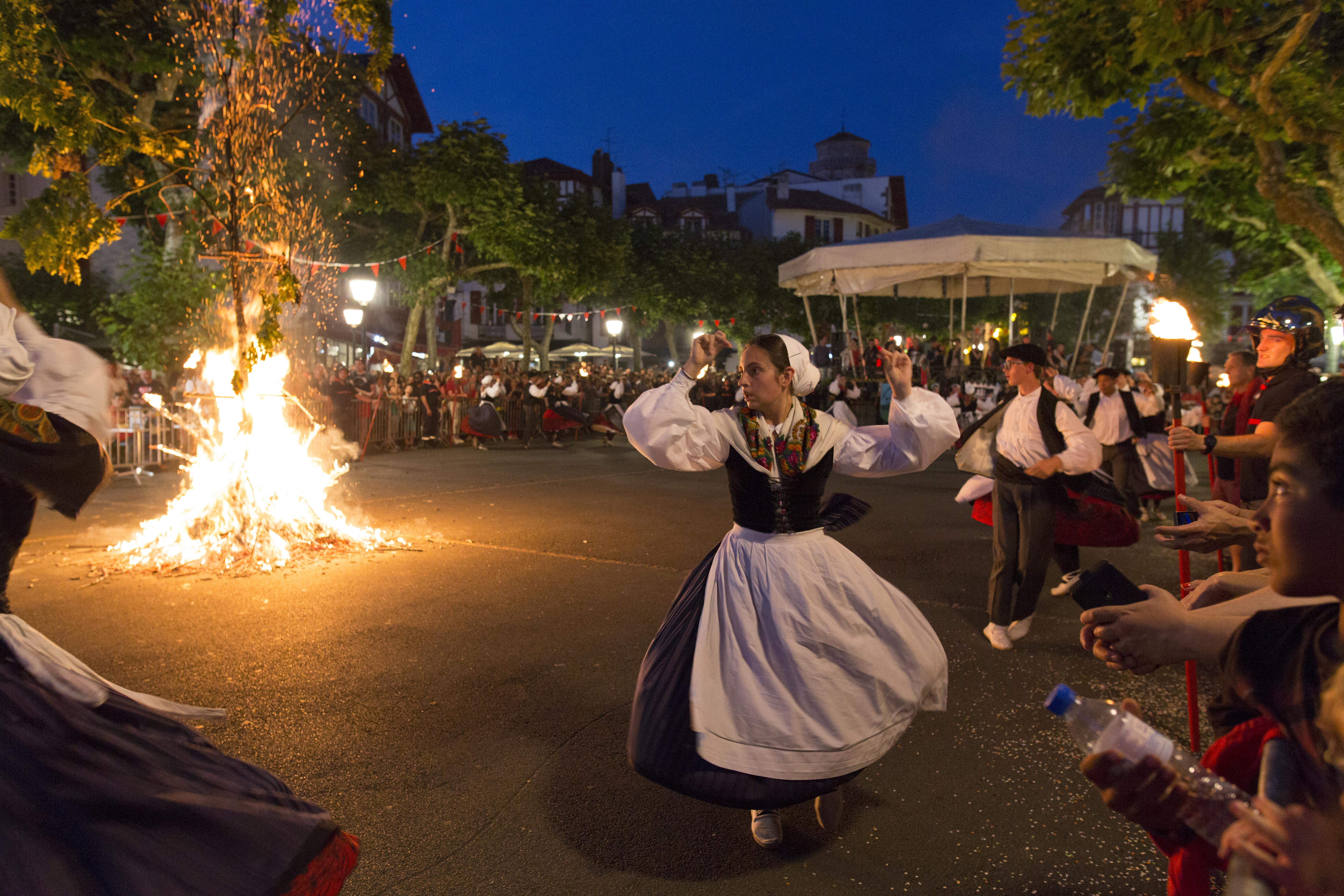 Fêtes de Saint-Jean-de-Luz. Danse.